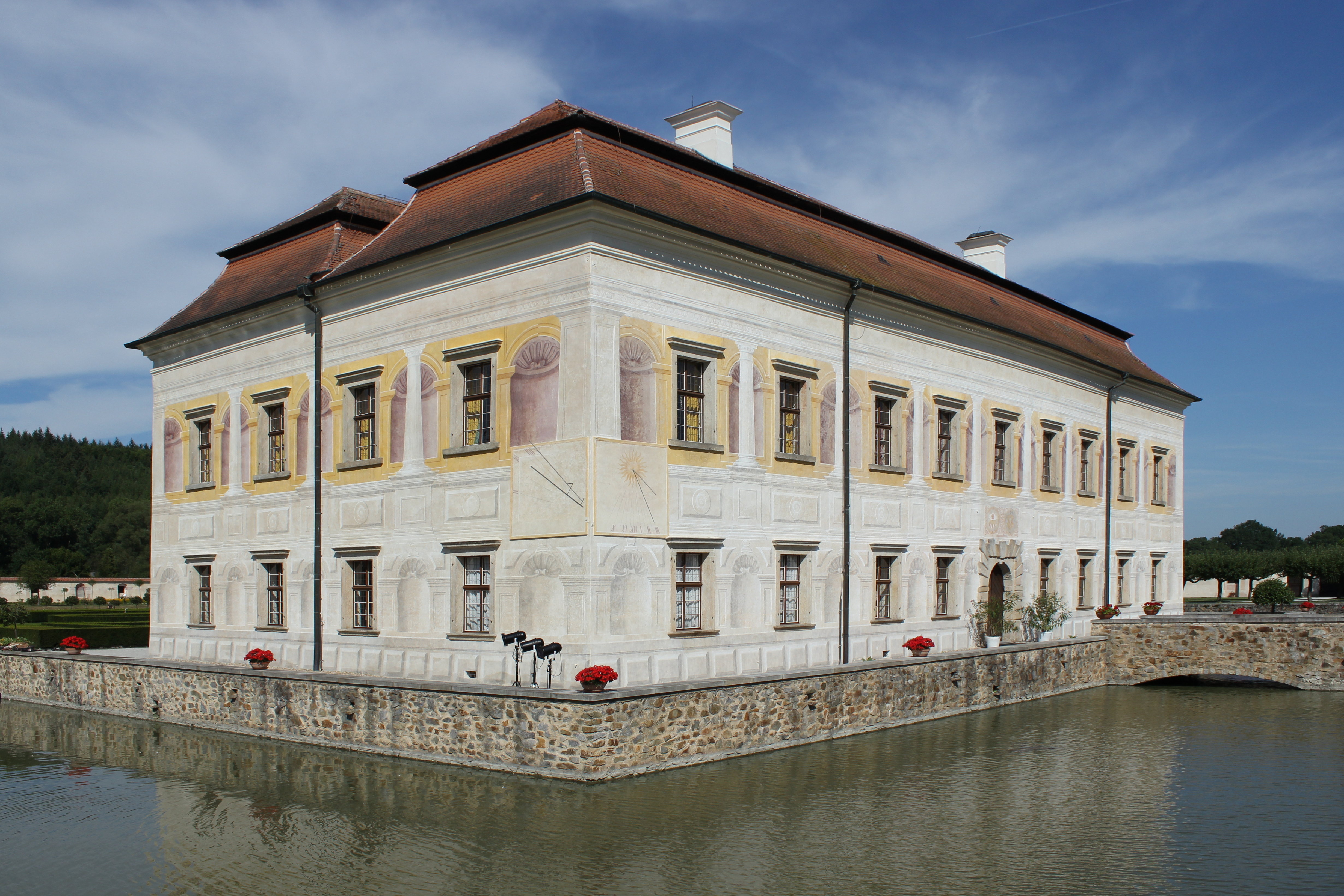 Jihozápadní pohled na zámek Kratochvíle.